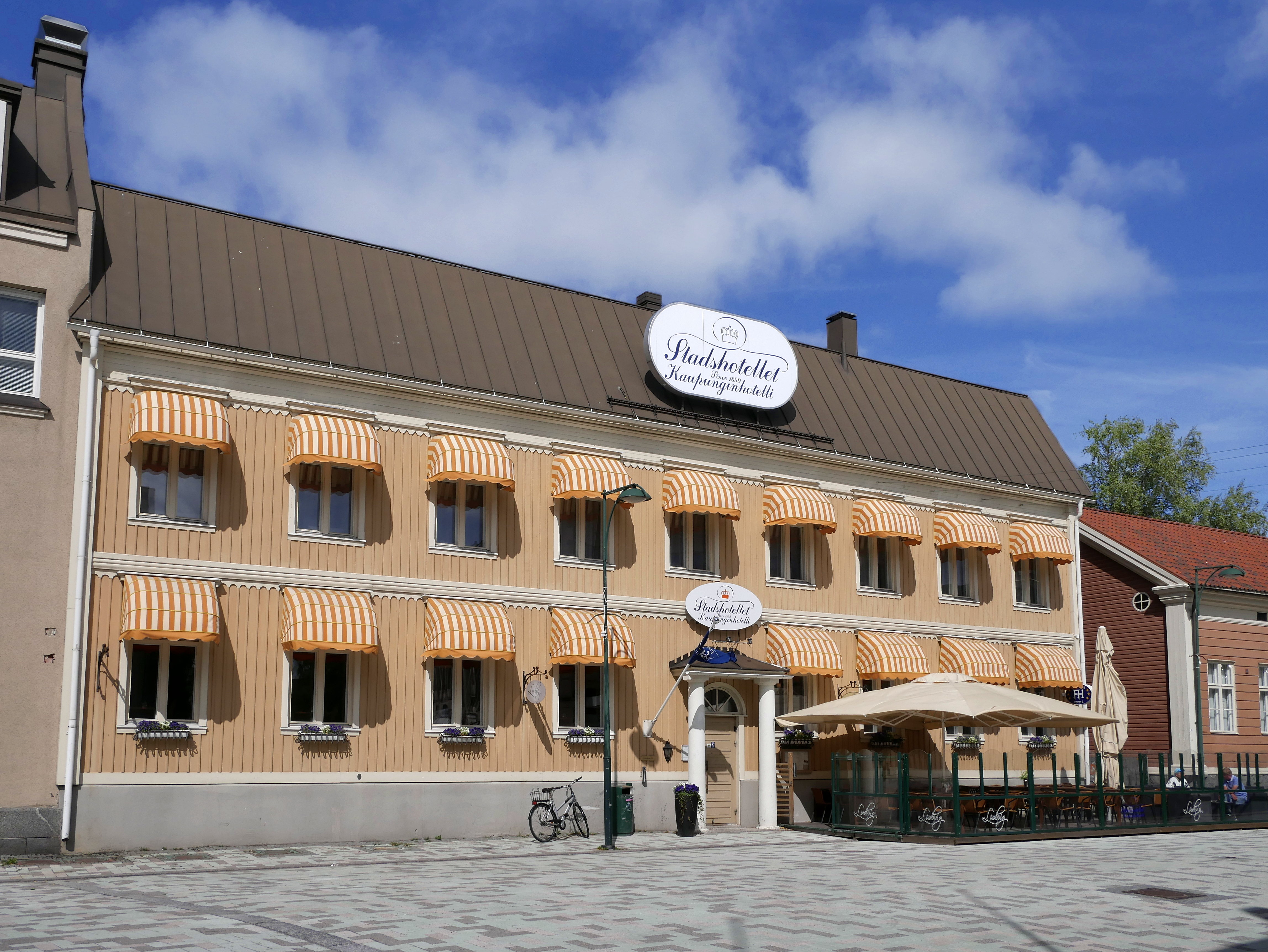 Stadshotellet Jakobstad.